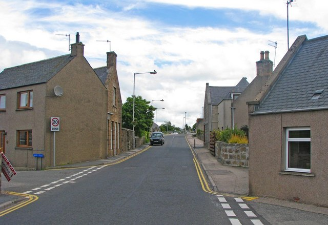 Oldmeldrum residential street